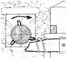 maglio di san martino parte 2